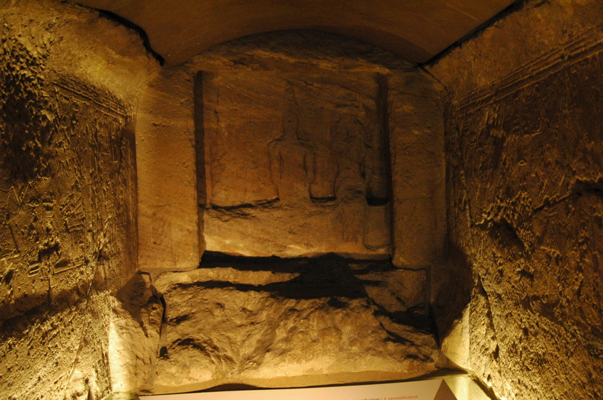 Tempel von Ellesija, ursprünglich von Thutmosis III. in Unternubien bei Qasr Ibrim errichtet, heute im Museo Egizio in Turin